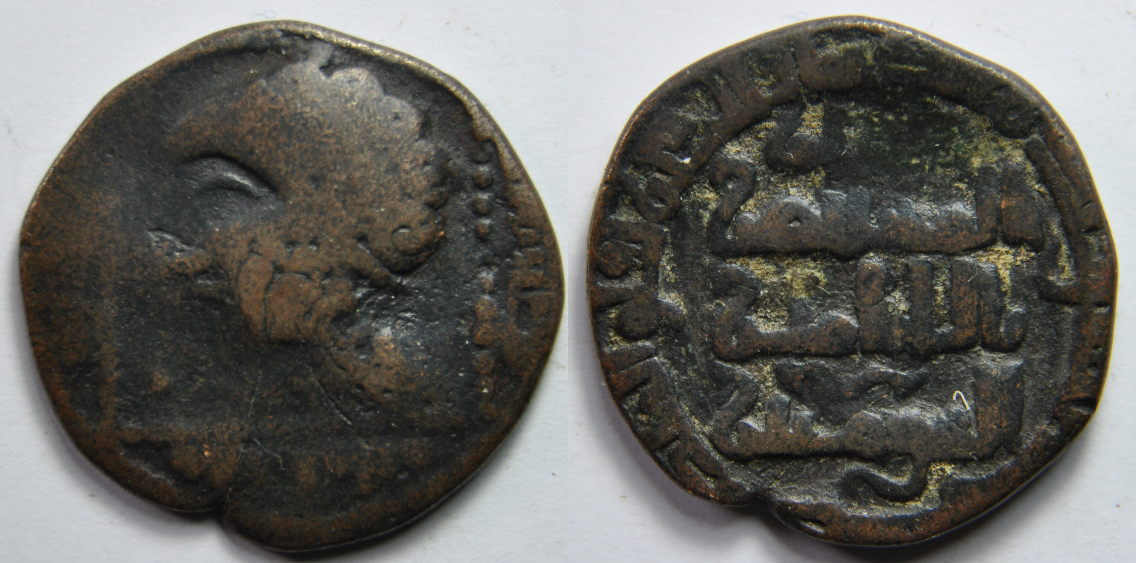 Une monnaie d'un dirham de bronze de Badr al-din Lulu, un mamelouk, vizir de l'émir, Nasir al din Mahmoud, dernier représentant de la dynastie des Zengides de Mossoul. Il est en poste à partir de AH 619 et usurpe le pouvoir en AH 631 jusqu'à sa mort en AH 657 (1234-1259 AD), S/568, 24mm, 6,4g A / buste diadémé à gauche dans un carré ; inscriptions non lisibles sur chaque face du carré. R / 4 lignes d’inscriptions arabes encerclé par une autre. Dimension : 24.8 mm Poids : 6.5 g. Référence : Mitchiner WI 1131